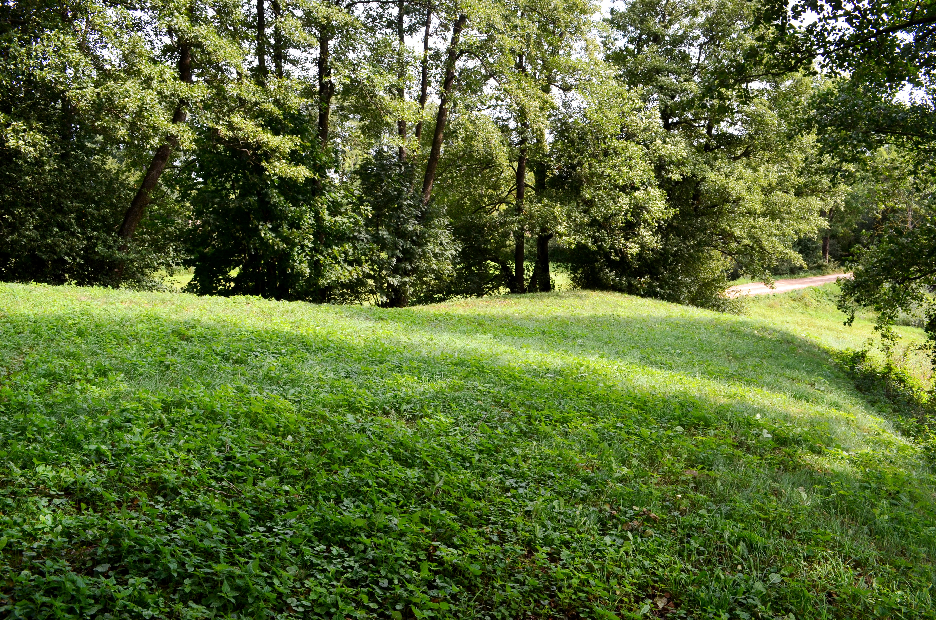 Piliūnų piliakalnis, Vilkaviškio raj.